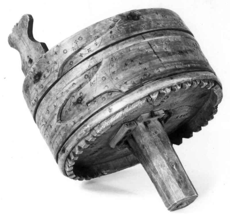 Øltrakt fra Hallingdal. Trakten er lagget og dekorert med svidekor og er tolig laget i første halvdel av 1800-årene. Foto Norsk Folkemuseum, NF.1922-0906.